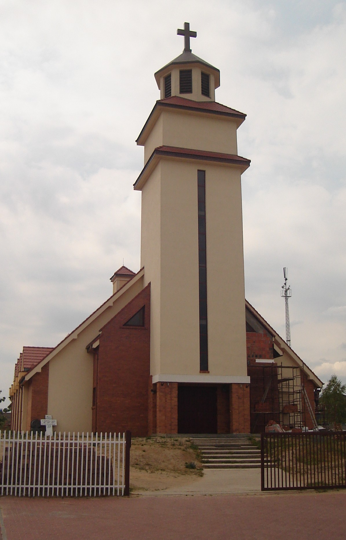 Kościół parafialny p.w. Matki Bożej Fatimskiej w Obrzębinie